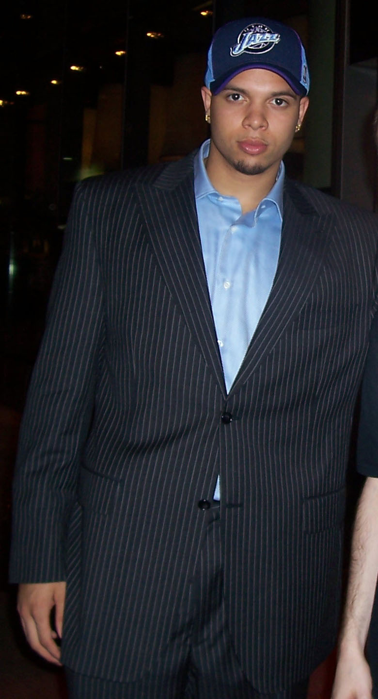 Deron Williams NBA Draft 2005